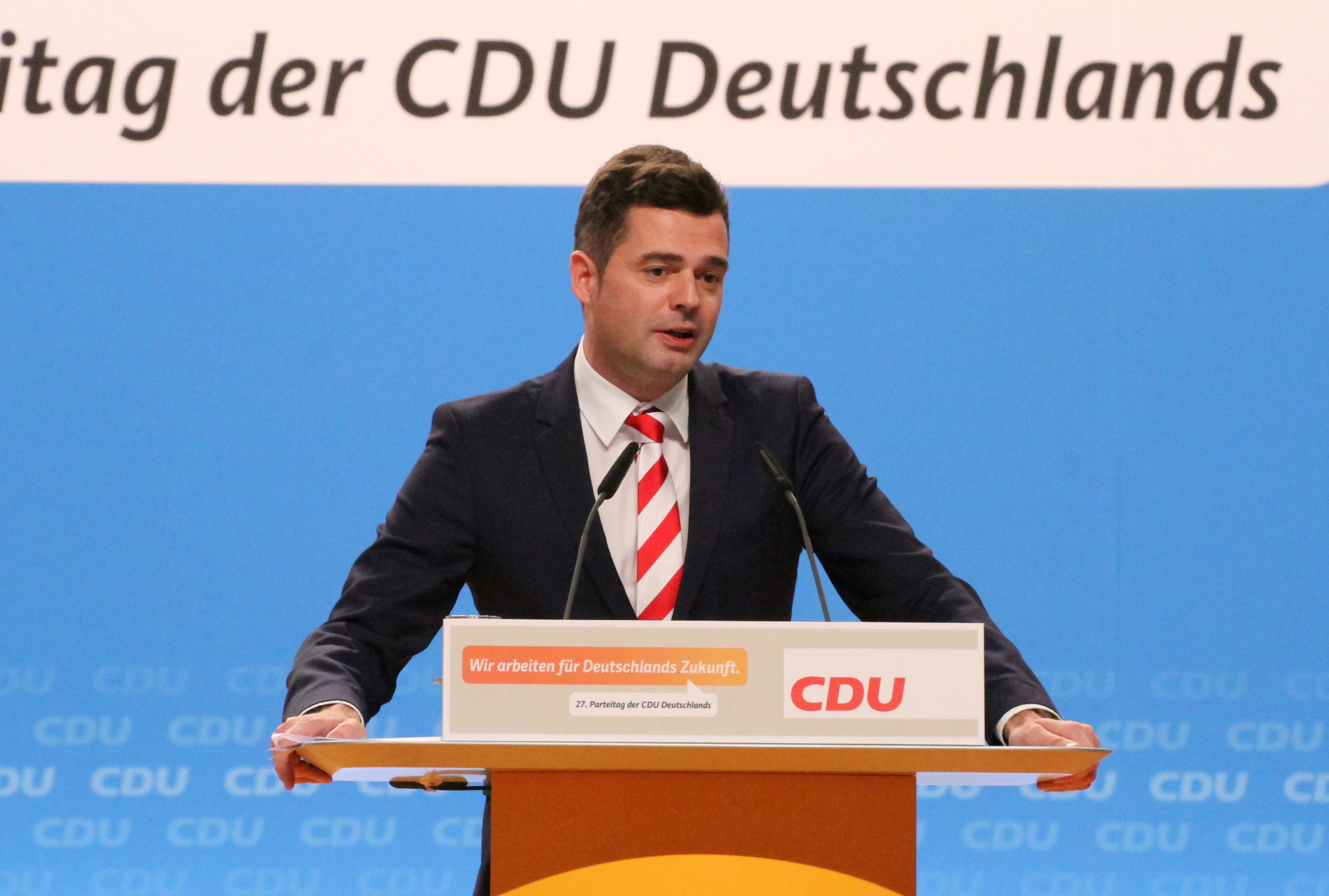 Mike Mohring auf dem CDU Bundesparteitag Dezember 2014 in Köln